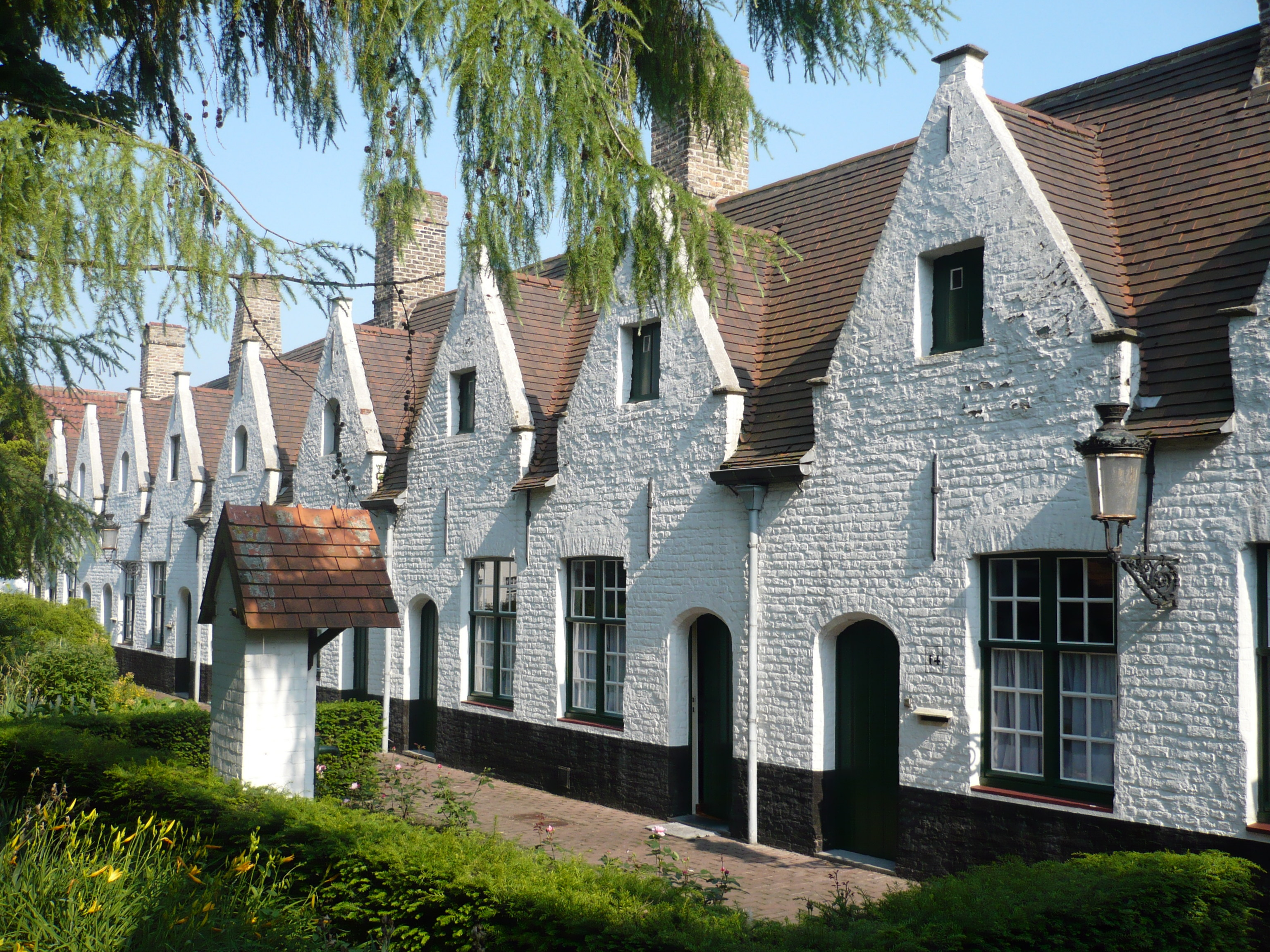 Bruges en Belgique ,(Brugge, België),Maison-Dieu "De meulenaere"